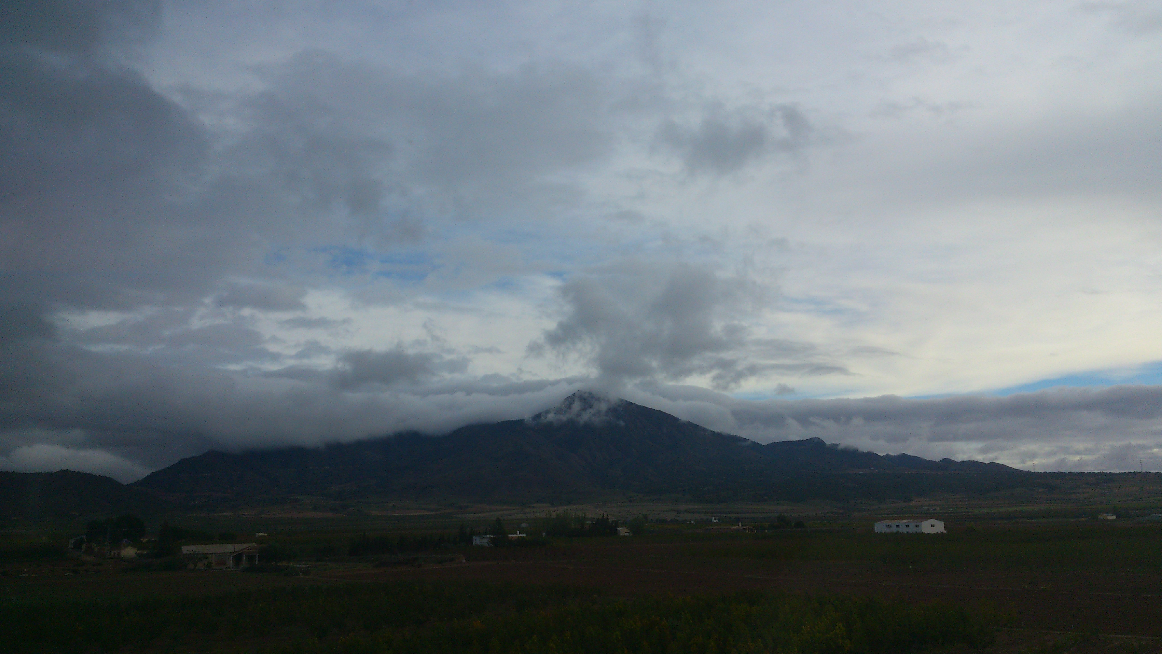 Sierra El Carche desde la autovía A-33